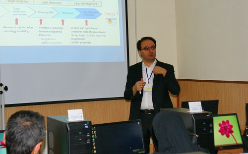 دانشکده داروسازی اردبیل - کارگاه کشوری "داکینگ مولکولی و کاربرد آن در طراحی دارو"